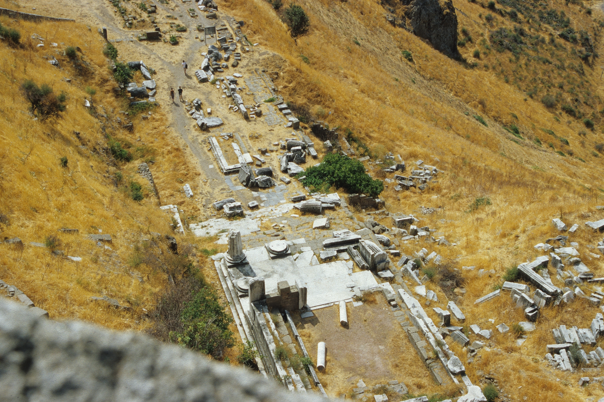 Pergamon, Westtürkei, Dionysostempel auf der Theaterterrasse